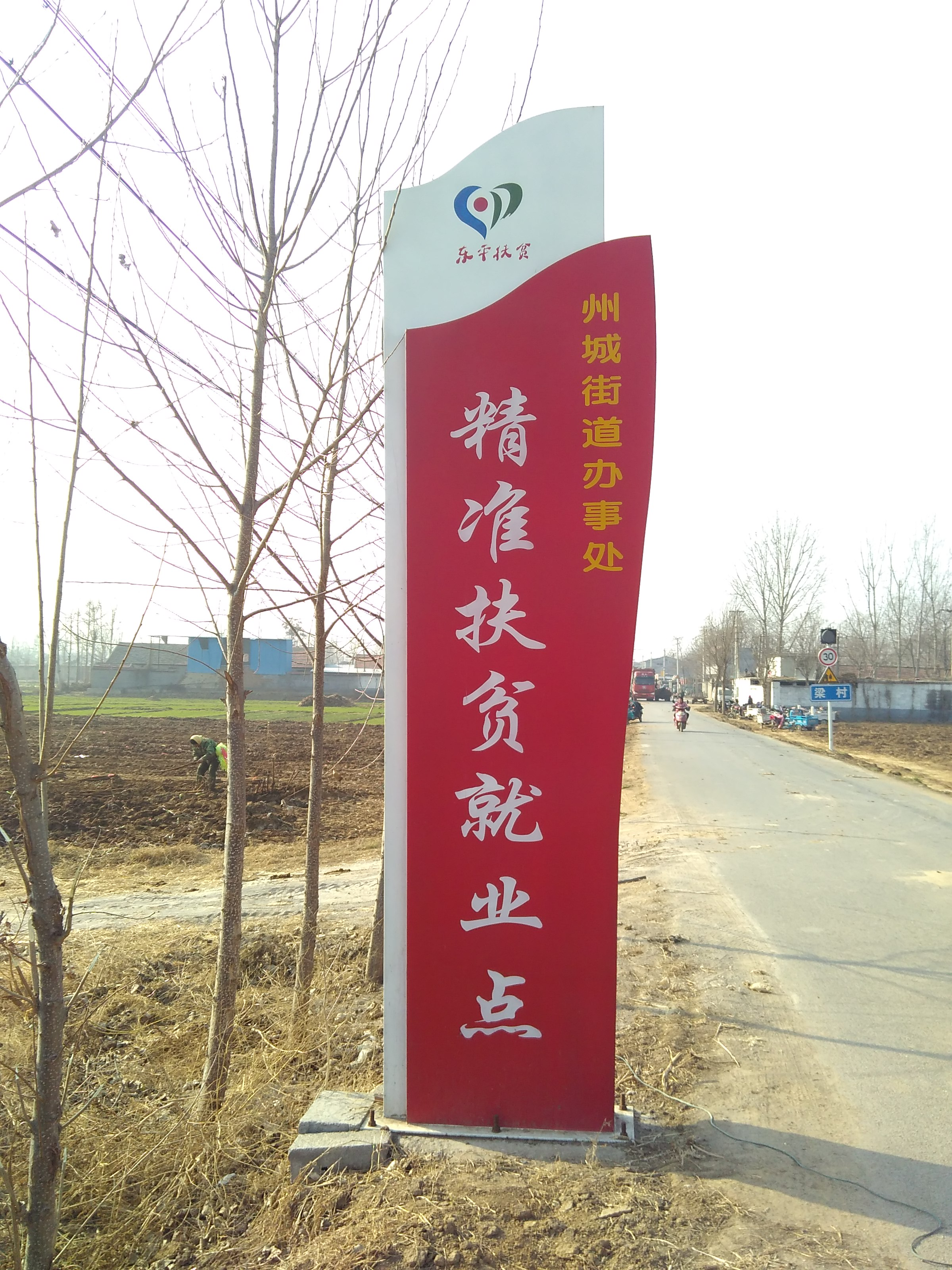 東平縣州城街道的一处精准扶贫就业点